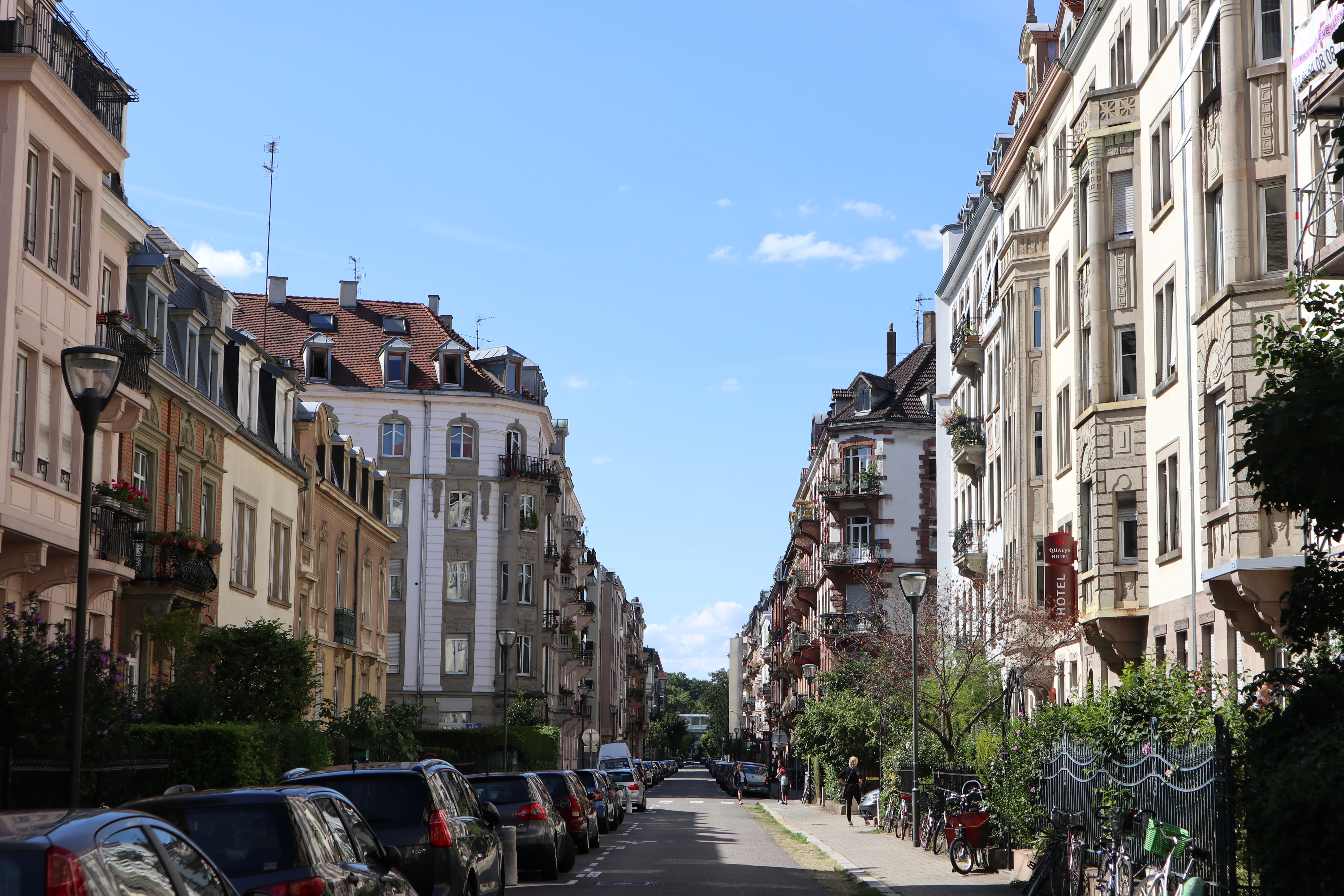 Rue Geiler, Strasbourg